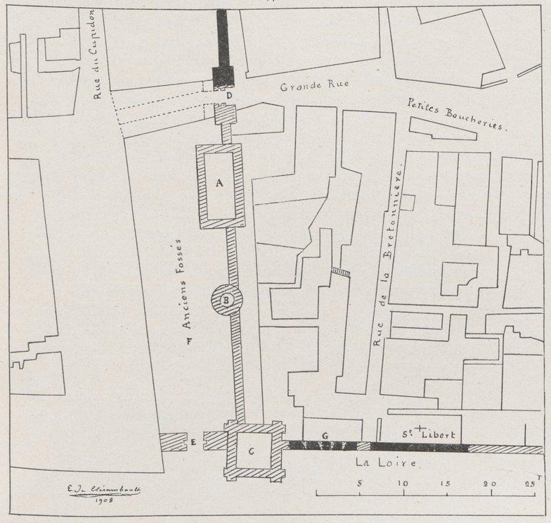 La tour Feu Hugon d'après un plan du XVIII° siècle, publié notamment dans É. G. de Clérambault, La tour Hugon et le château de Tours in Bulletin de la Société archéologique de Touraine (BSAT), tome XVI, L. Péricat, 1907-1908, p. 241